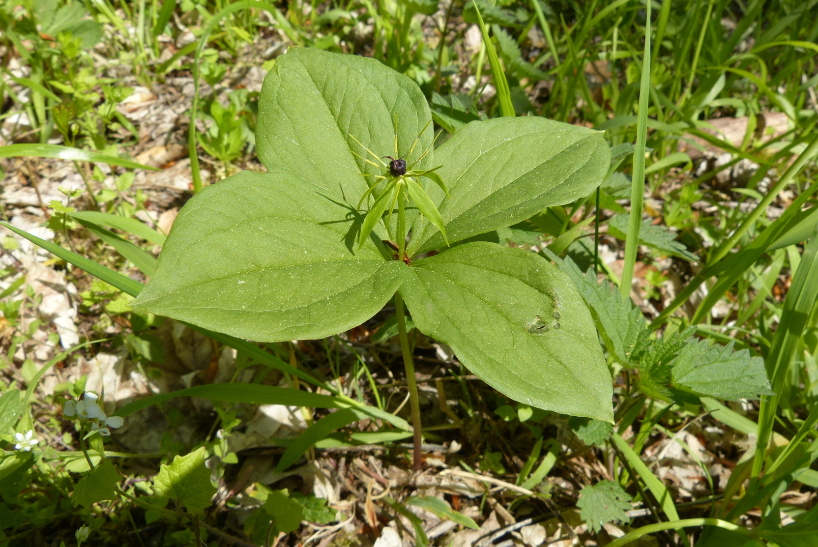 Einbeere blühend